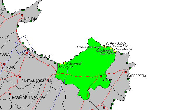 Karte der Strände und Buchten im Gemeindegebiet Arta, Mallorca (Balearen)